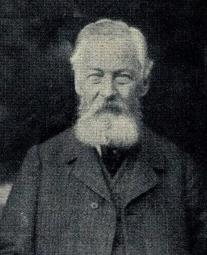 Professor Hugo Laspeyres, 1906